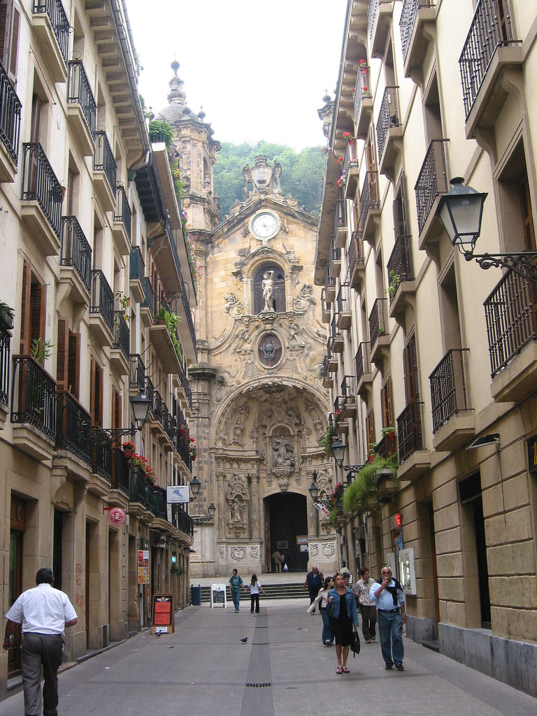 Donostiako Andre Mariaren basilika.